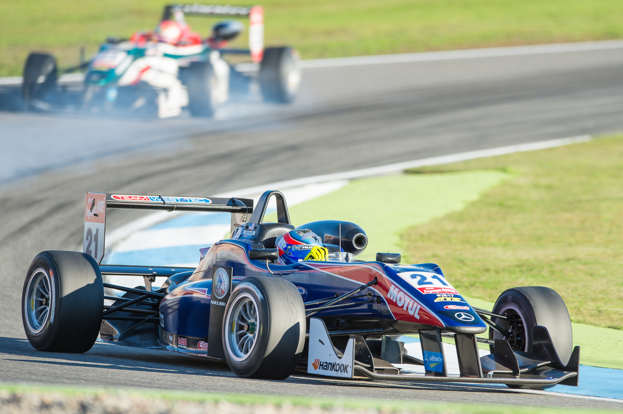 DTM,Dallara F312,Deutsche Tourenwagen Masters,F3 FIA European Championship,FIA Formel 3 Europameisterschaft,Felix Serralles,Hockenheimring,Mercedes-Benz,Motorsport,Team West-Tec F3